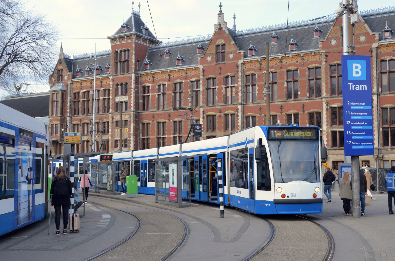 GVB lijn 11 op het Stationsplein